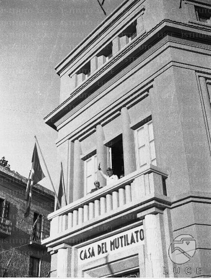 Mussolini a Trapani nel 1937, si affaccia dal balcone della Casa del mutilato